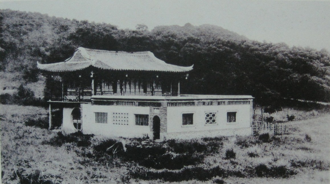 1918年遷建的潛園爽吟閣，北白川宮能久親王曾經入宿於此。今已被拆毀。